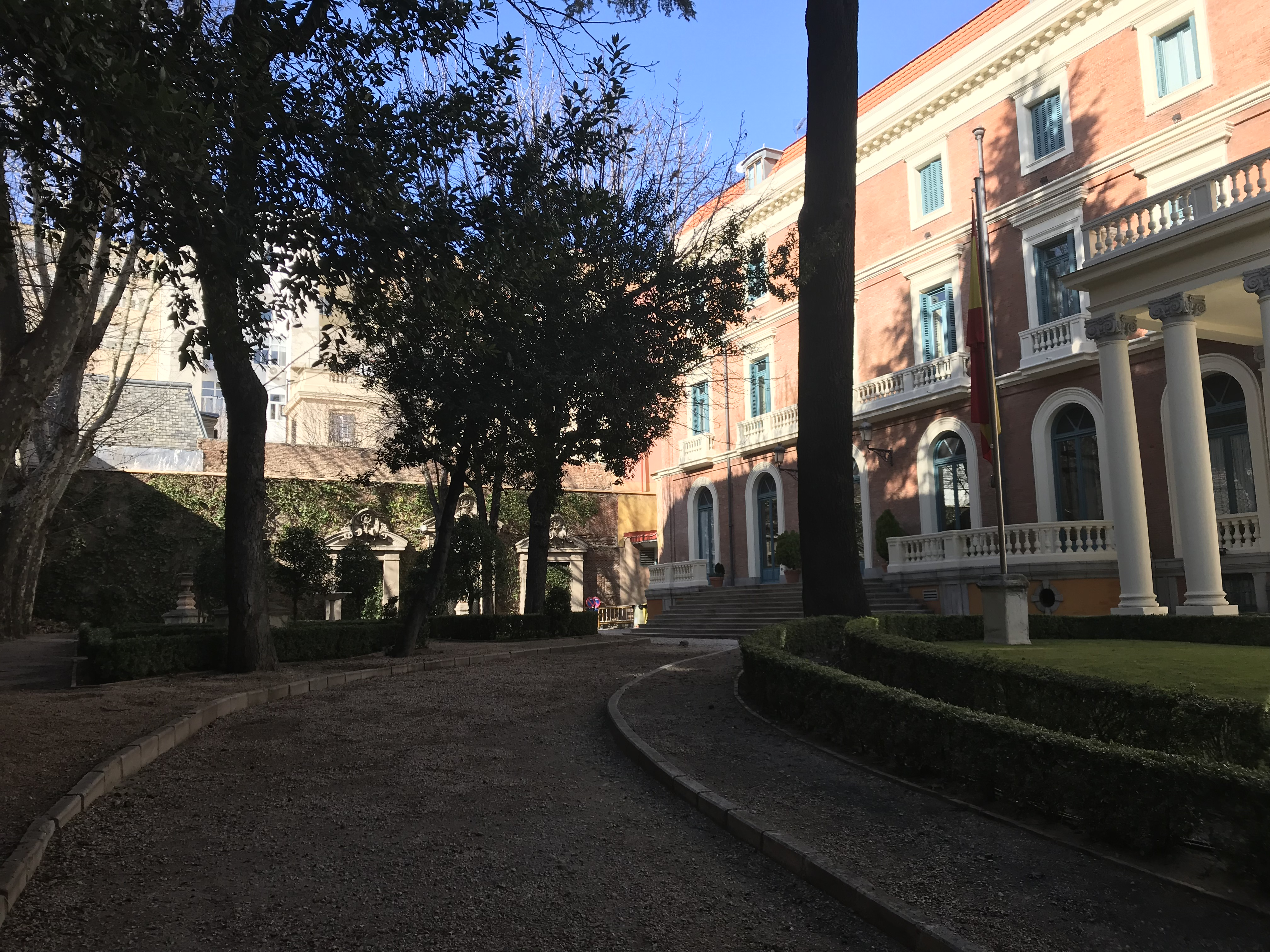 Palacio de Zurbano, jardín